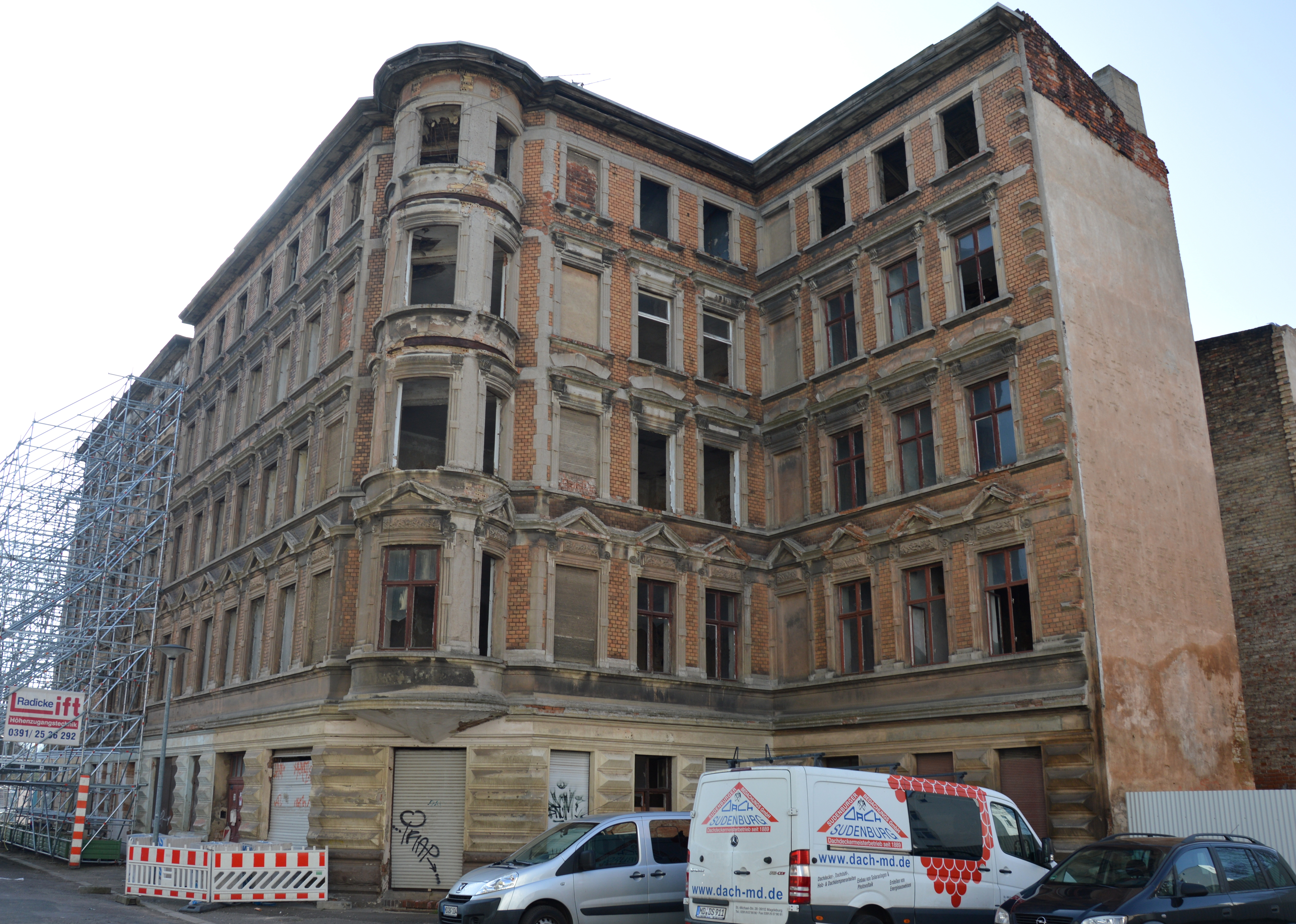 Sudenburger Straße 23 in Magdeburg